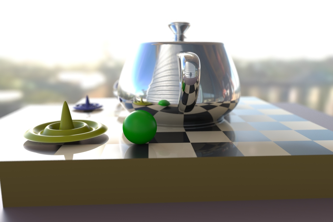 The nice sunny environment map was made by Nick Bertke; you can see his (distorted) reflection in the right side of the teapot. :-)